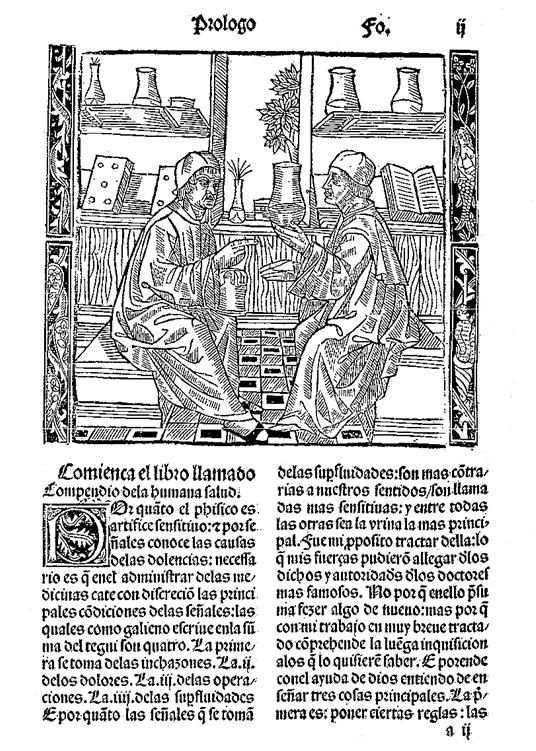 Frontispicio de la primera edición en español del libro de Johannes de Ketham: Compendio de la humana salud. Pamplona: Arnao Guillén de Brocar; 1495.